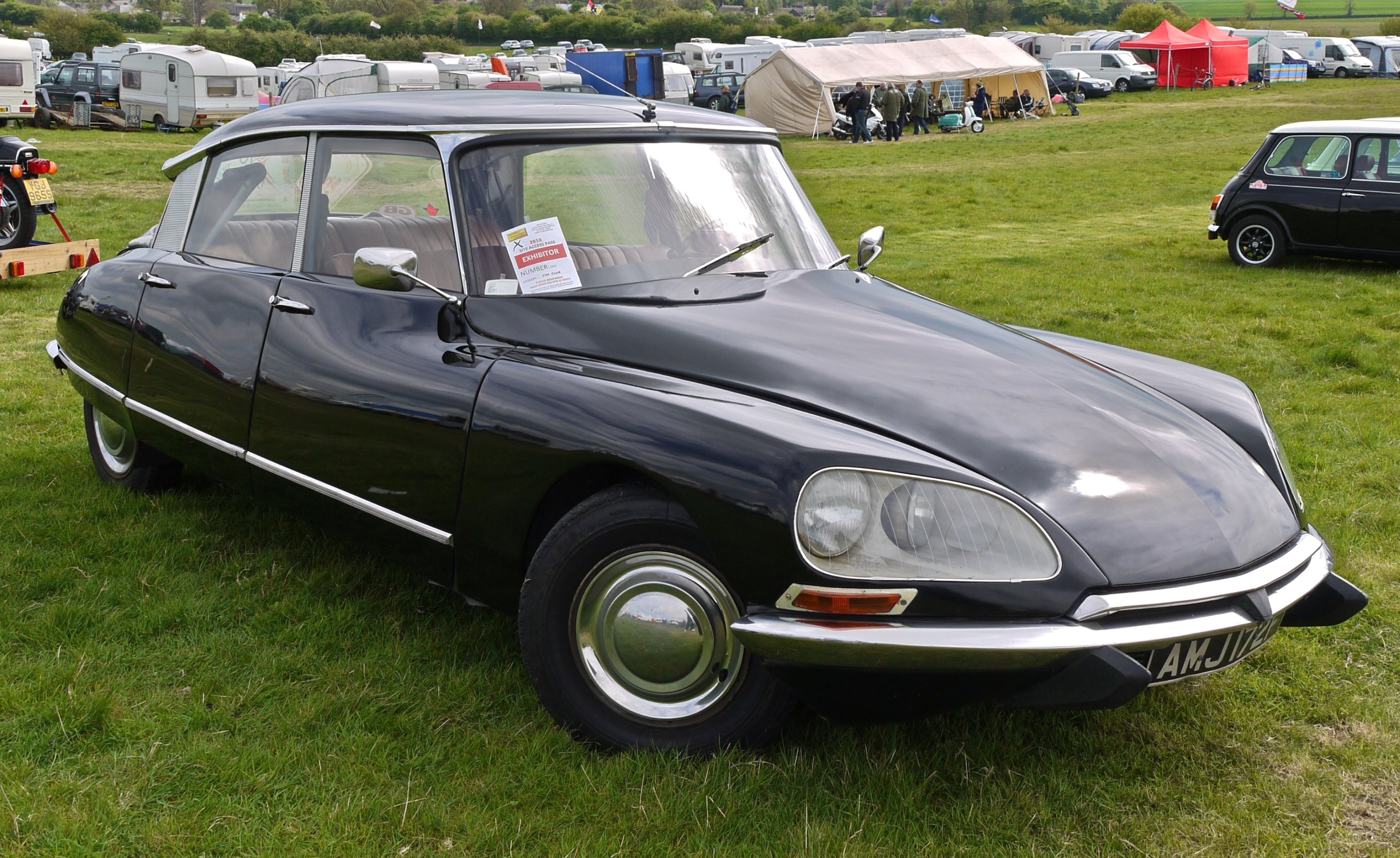 Panasonic G1 14-45 Lens